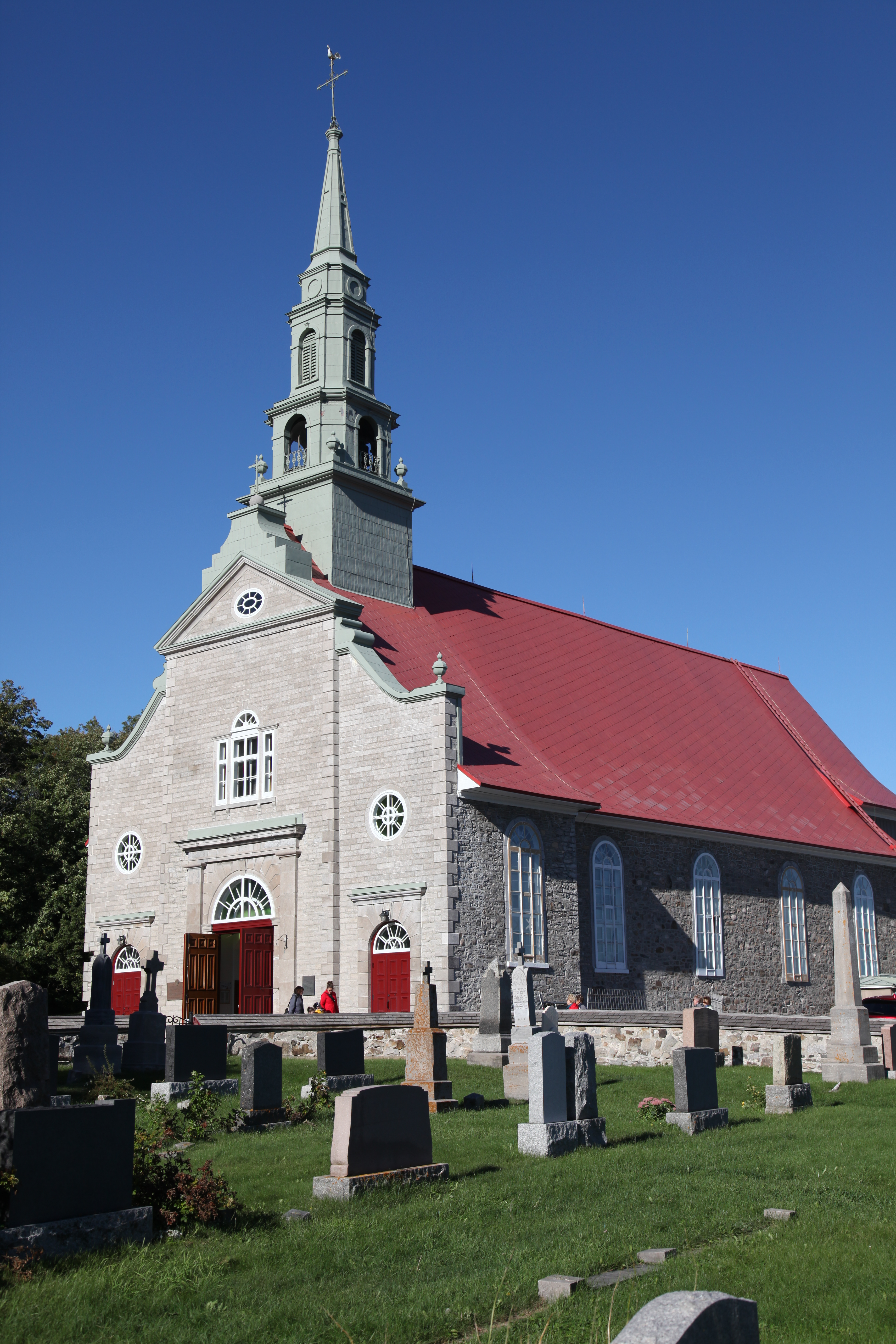 L'église de Saint-Jean, classée en 1957, est un lieu de culte de tradition catholique construit de 1734 à 1737 et allongé par son façade en 1852. Située en bordure du Saint-Laurent, elle constitue un point de repère à la fois terrestre et fluvial, qui souligne la vocation maritime du village de Saint-Jean. Cet église figure parmi les dix églises les plus anciennes à subsister au Québec. La valeur patrimoniale de l'église de Saint-Jean repose sur son intérêt architectural. L'édifice est caractéristique des églises paroissiales du Régime français et témoigne également de transformations effectuées au XIXe siècle pour l'adapter aux besoins de la paroisse et au goût du jour. Elle présente une nef rectangulaire à un vaisseau et un choeur plus étroit terminé par une abside en hémicycle, une maçonnerie de moellons et un toit aigu à deux versants légèrement retroussés. Allongée par la façade en 1852, elle a alors été dotée d'une façade-écran d'influence néoclassique. L'architecte-sculpteur Louis-Thomas Berlinguet (1789-1863), qui dirige les travaux avec son fils Louis-Flavien, s'inspire des façades de la basilique-cathédrale Notre-Dame de Québec. Cette influence est illustrée notamment par l'avant-corps central couronné d'un fronton triangulaire et flanqué d'ailerons masquant la pente du toit. Le clocher reprend la forme novatrice de celui de la cathédrale anglicane Holy Trinity de Québec. L'église de Saint-Jean évoque donc la réalité de plusieurs paroisses qui ont dû agrandir leur église en raison de l'accroissement de la population et témoigne de l'évolution architecturale des églises du Régime français.